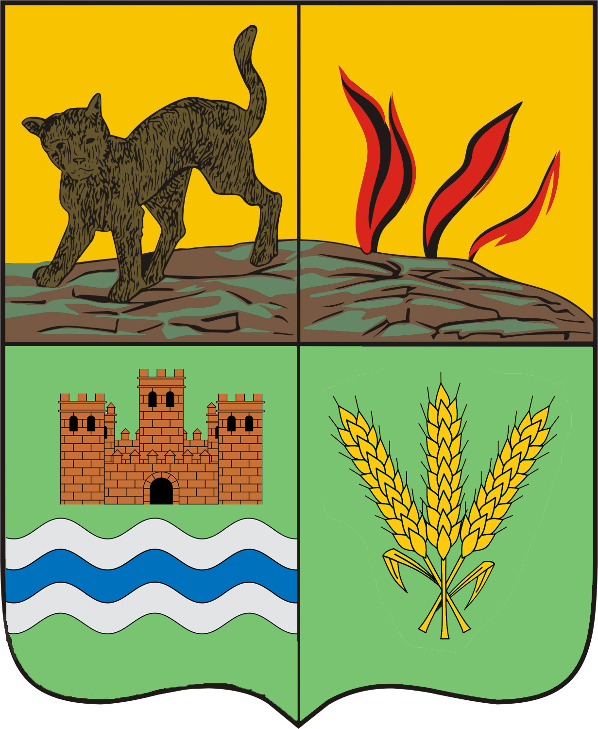 Герб города Губа (Азербайджан). Картина ссылается на официальный сайт - [1] и [2]